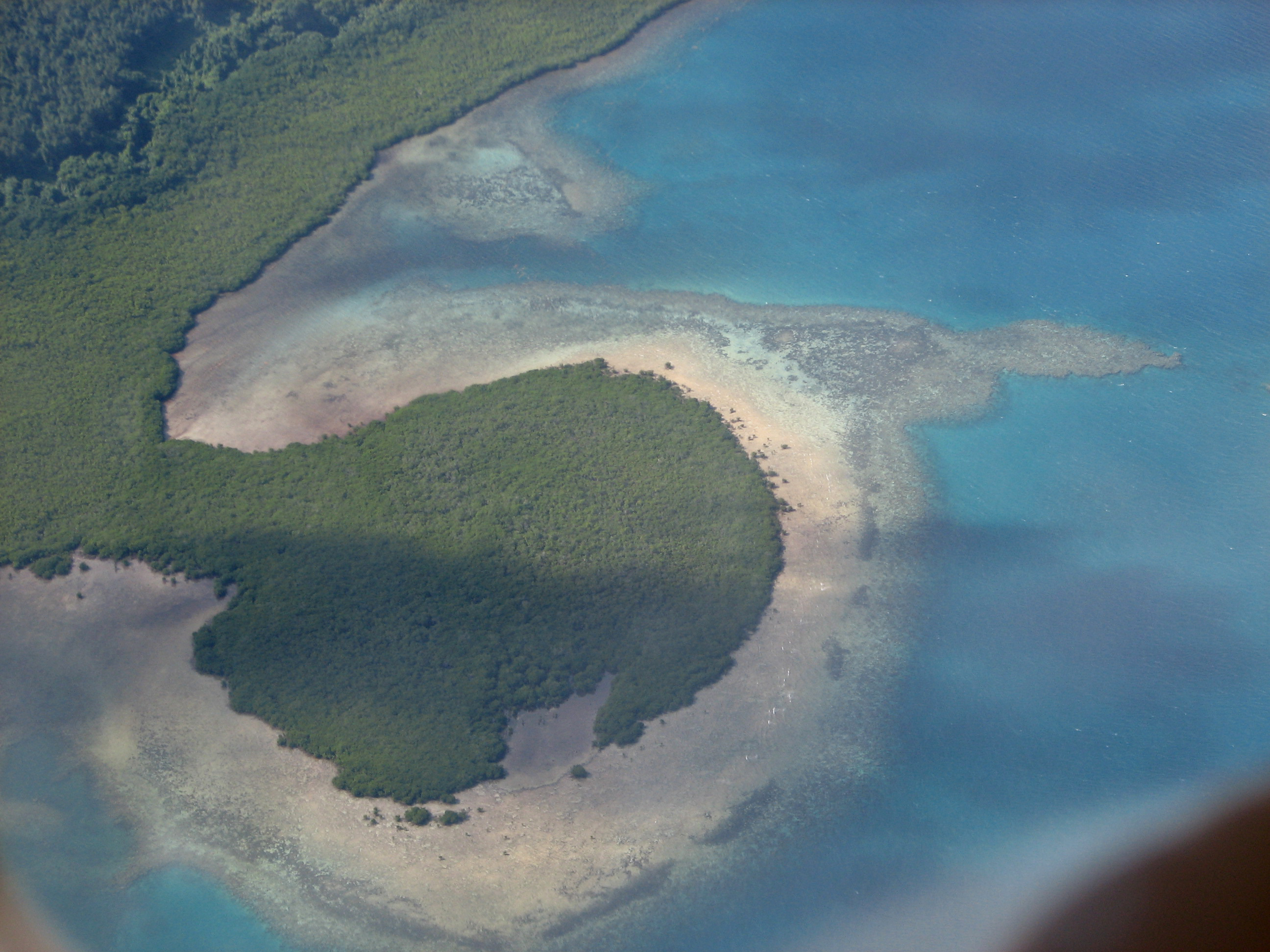 Mangrove sur platier corallien aux îles Fidji